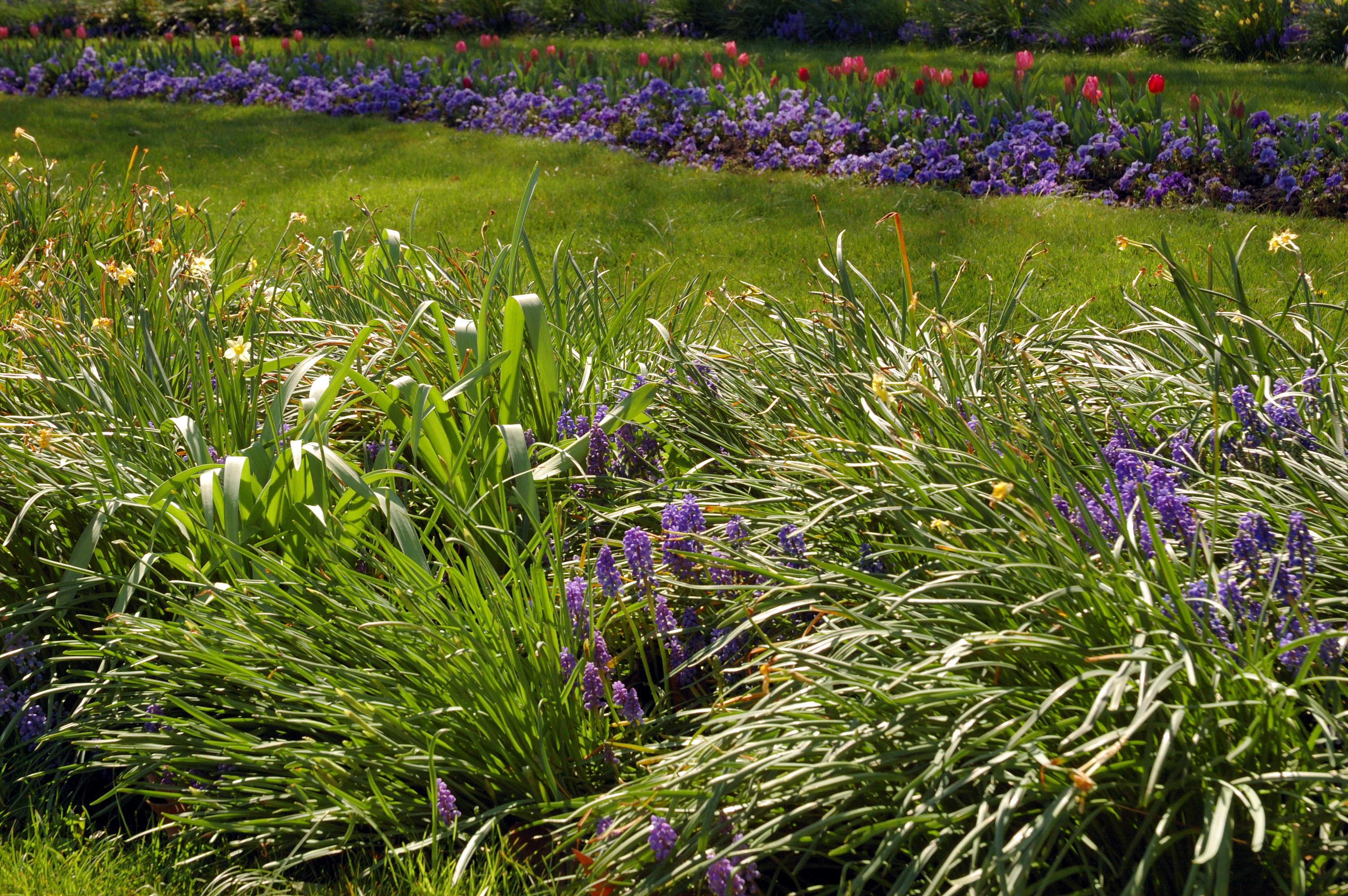 Composition florale de muscari et narcisses dans "Les Parterres" du Parc de Bercy (Paris 12)